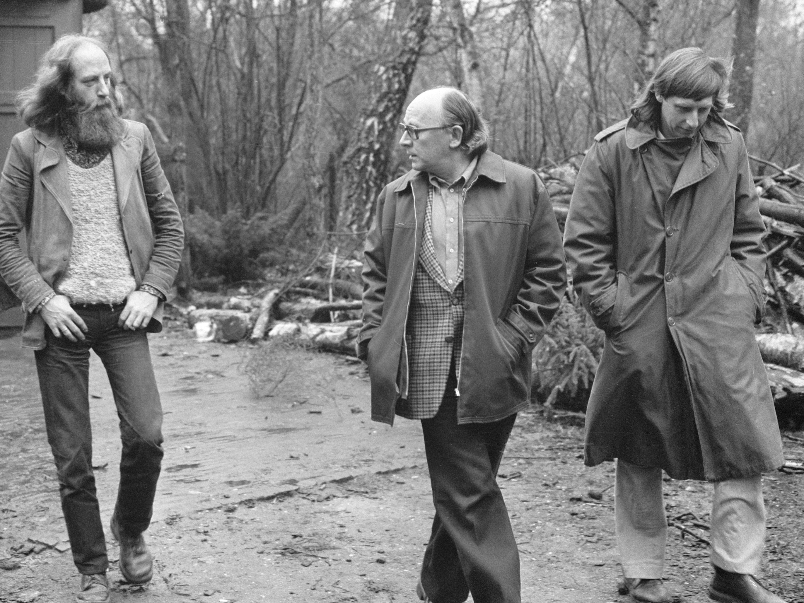 De perikelen rond Dennendal; v.l.n.r. Carel Muller, Piet Reckman en Kay Okma (bestuur Nieuw Dennendal) 29 januari 1974